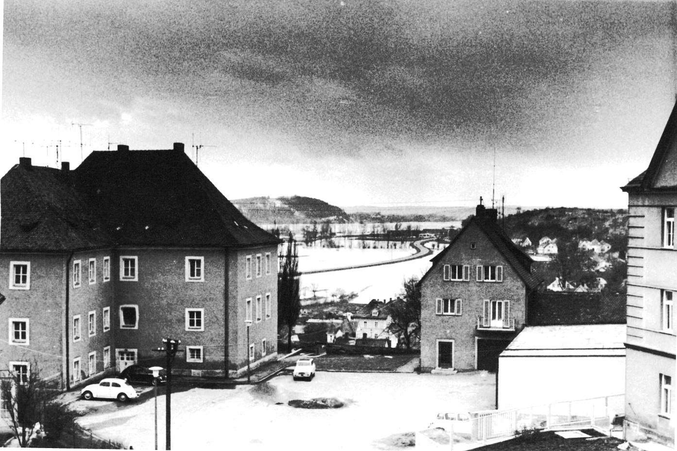 Die Vogtei (l.), das alte Feuerwehrhaus (m.) und die St. Josefsanstalt (r.), im Hintergrund Hochwasser im Maintal